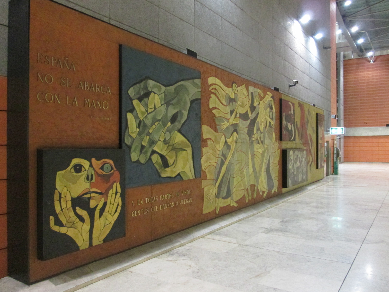 Oeuvre de Guayasamin exposée dans une station du train qui relie les différentes parties du terminal 4 de l'aéroport Madrid-Barajas.Probablement .